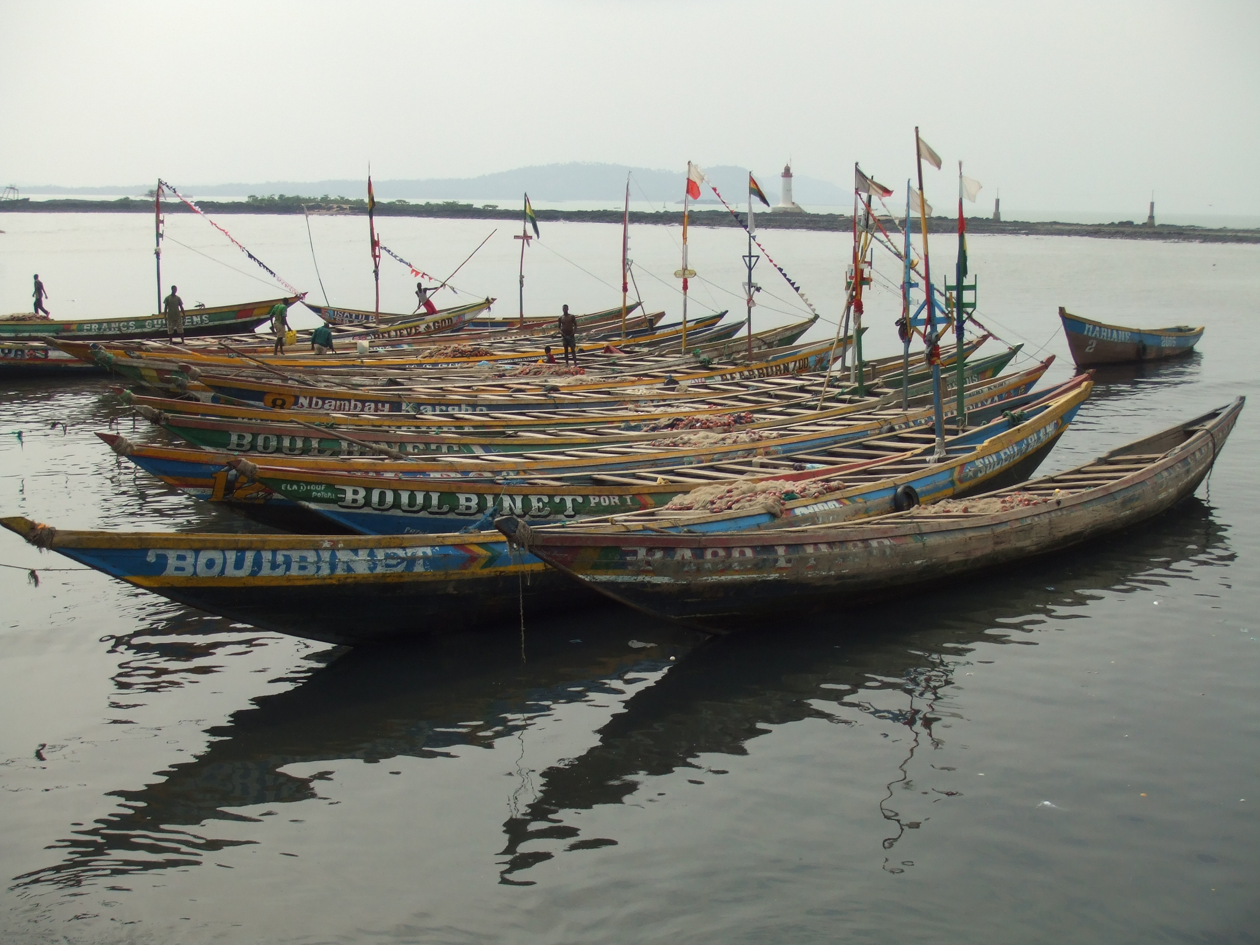 Conakry